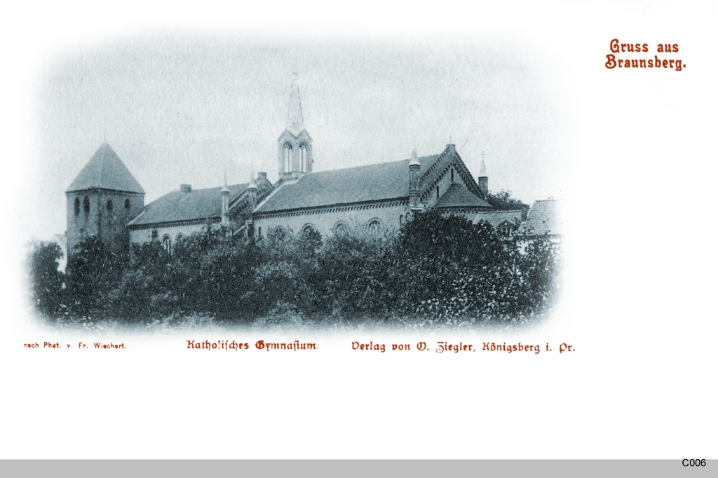 Braunsberg in Ostpreußen: Katholisches Gymnasium.